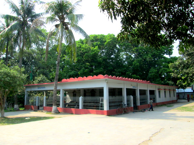 আলী শাহান শাহ্‌ বাবা আদম কাশ্মিরী (রঃ) মাজার